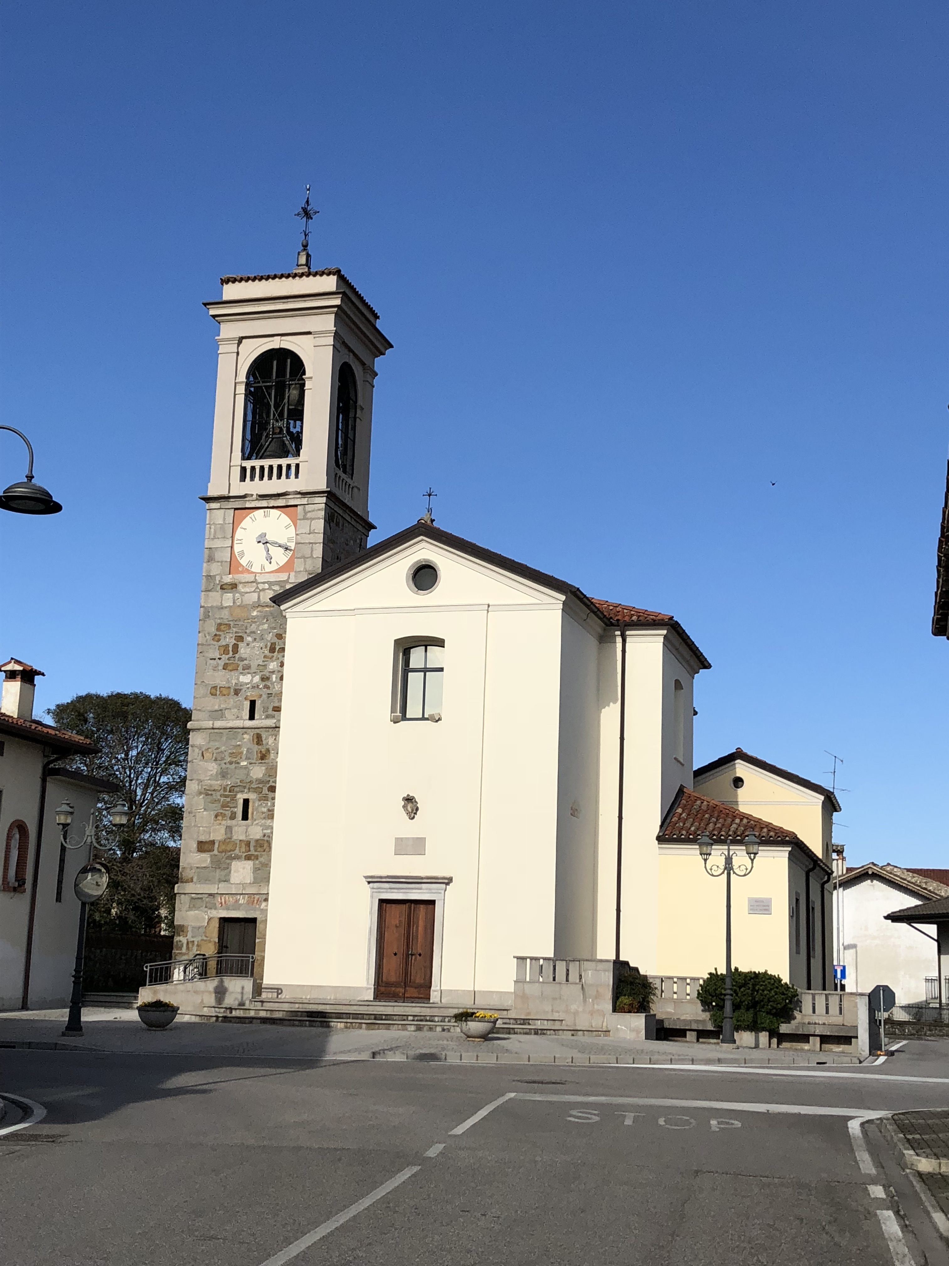 Chiesa Manzinello